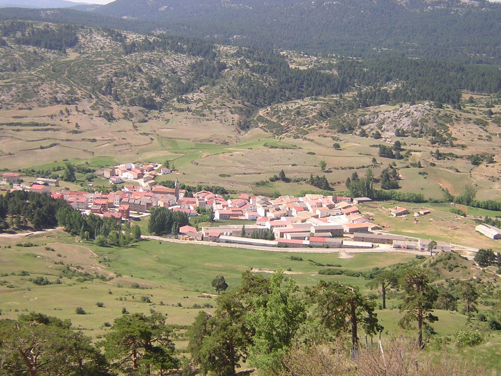 Guadalaviar desde la Muela de San Juan